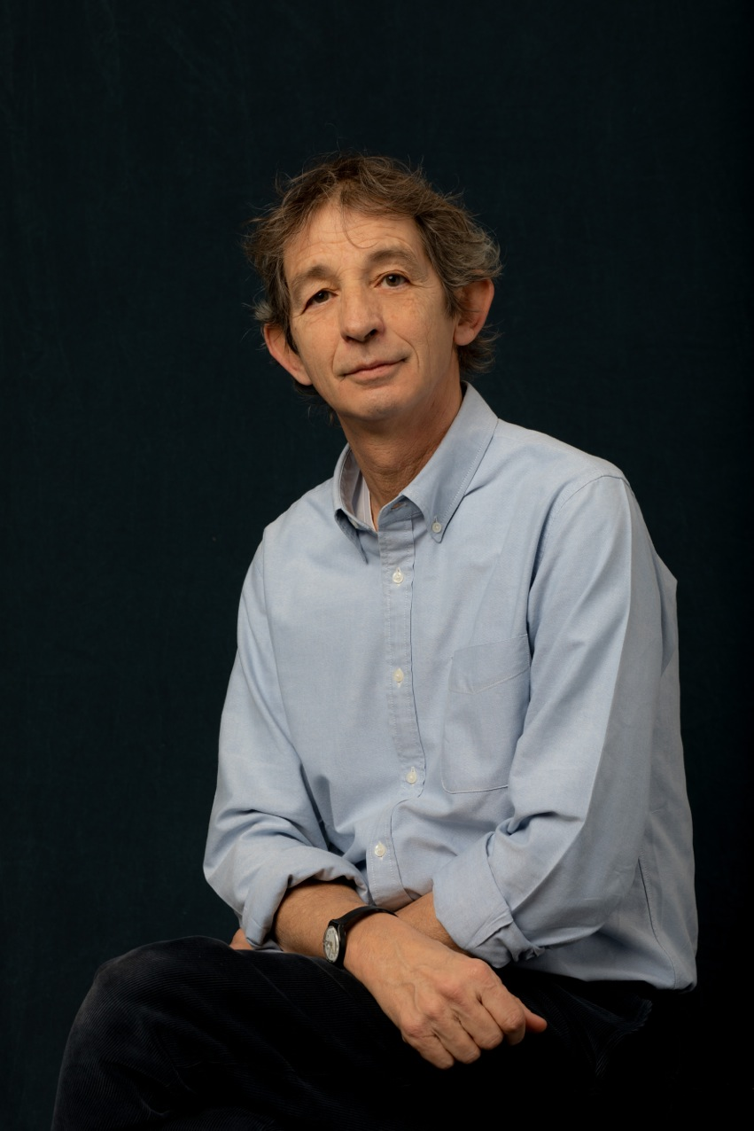 Aldo Vitali, direttore di Tv Sorrisi e Canzoni, Telepiù, Guida Tv e Il mio papa © Pigi Cipelli (Mondadori).